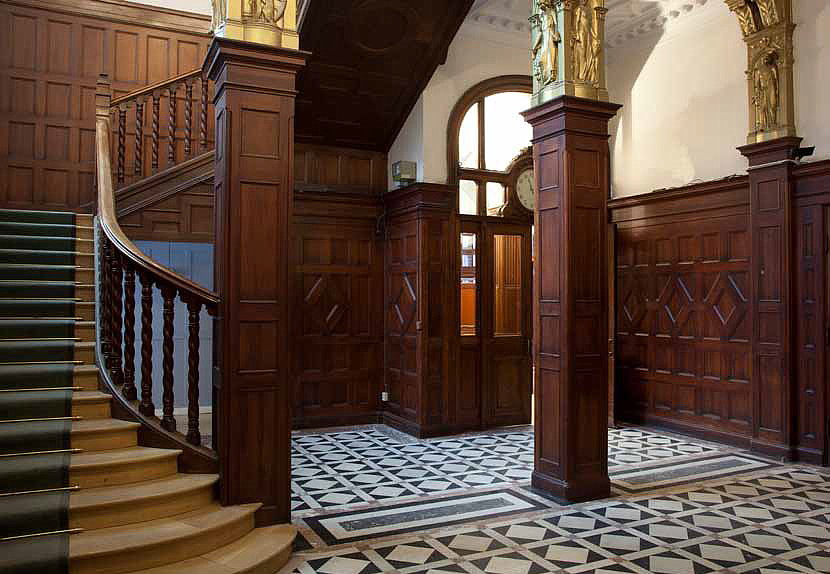 AB Separators gamla huvudkontor, entréhall